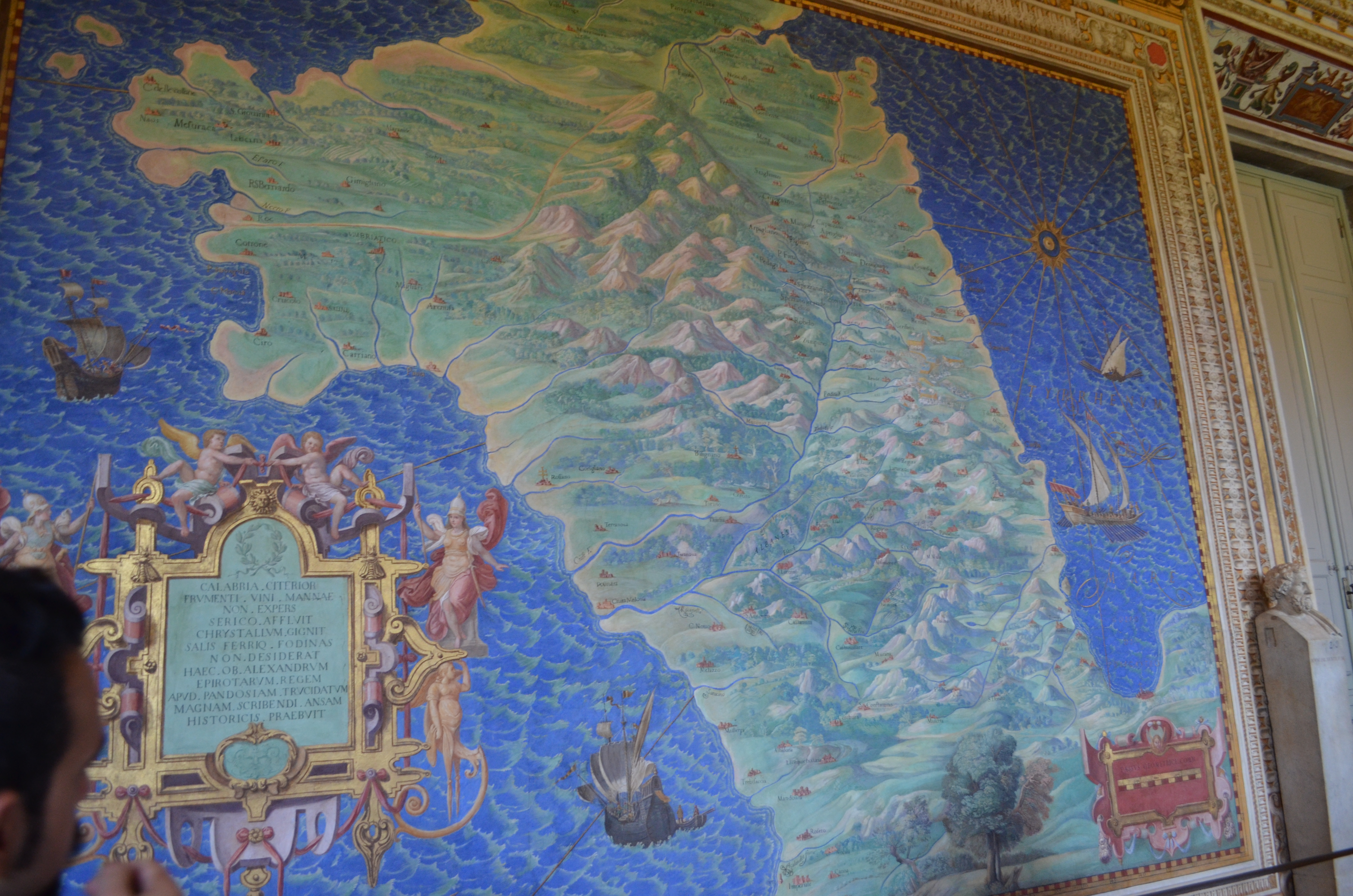 Vatican Museums